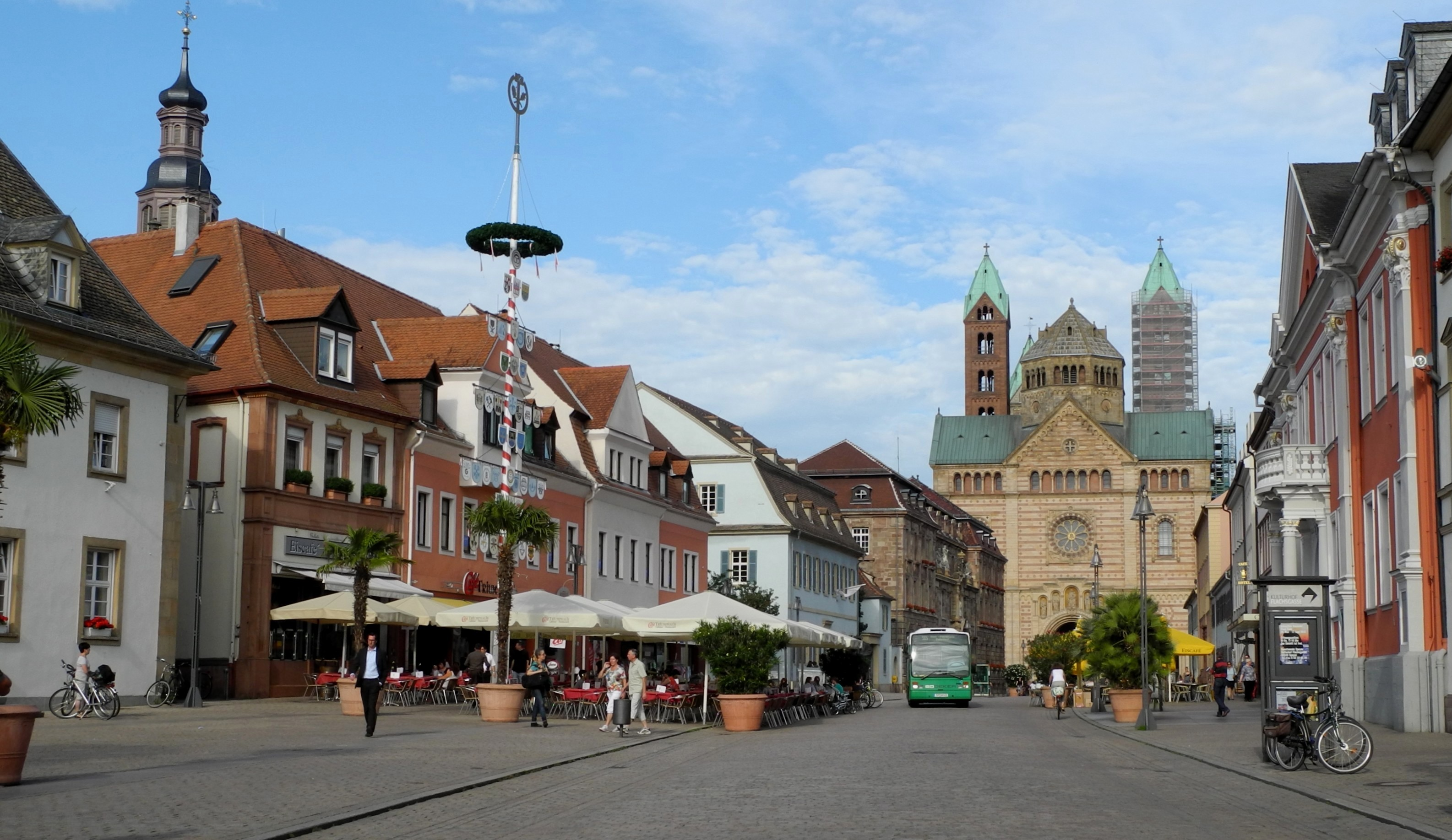 Speyer - Dom ab 1025, MaximilianstraßeRomanesque churches in Rhineland-Palatinate